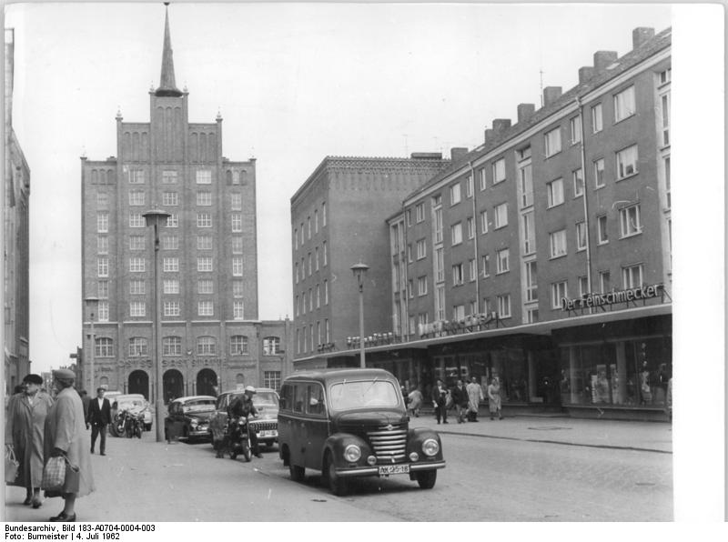 Rostock, Breite Straße Zentralbild Burmeister Sta-Kt 4.7.1962 Zur Vorbereitung der Ostseewoche Die alte und doch so junge See-, Werft- und Hafenstadt Rostock ist auch in diesem Jahr wieder Gastgeber zur Ostseewoche. Tausende Gäste aus den Ostseeländern, Norwegens und Islands werden sich von dem großen Aufbautempo im Norden der DDR überzeugen können. UBz: Die in den letzten Jahren neu entstandene Breite Straße in Rostock.